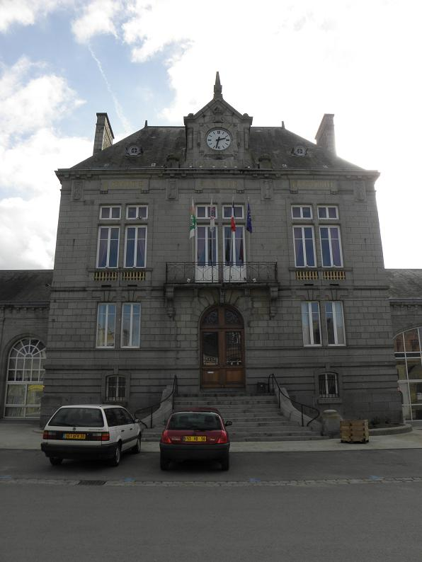 Mairie de Pontorson (50).